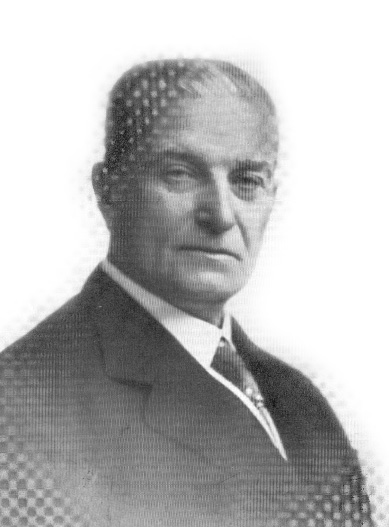 Karel Herfort (1871 - 1940), Český lékař, zakladatel dětské psychiatrie.